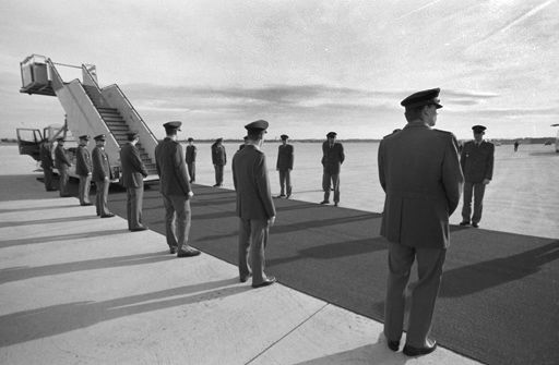 Staatsbesuch